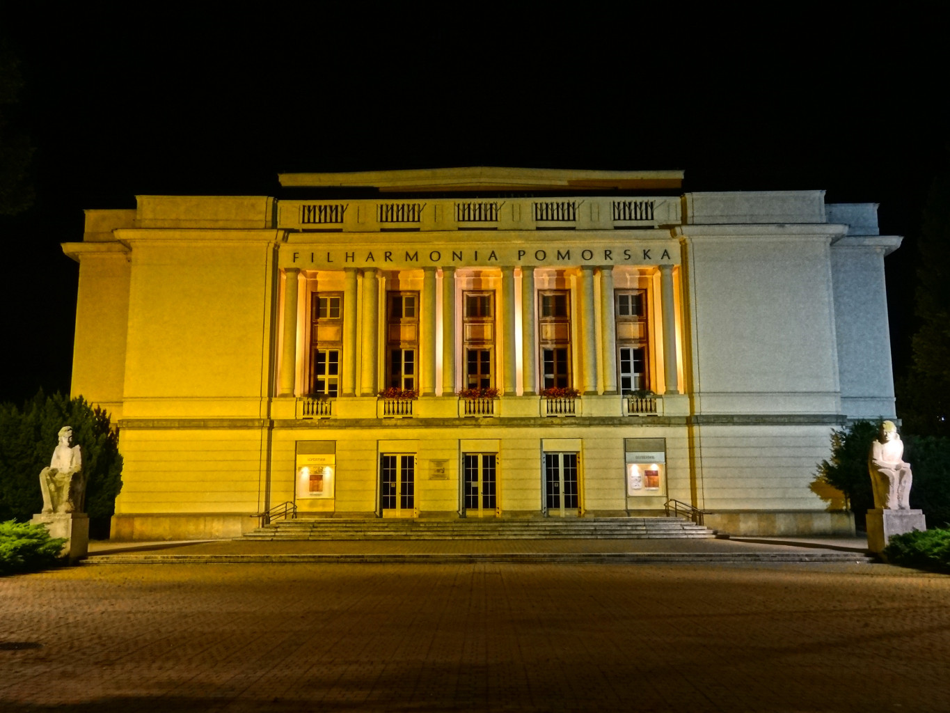 Budynek Filharmonii Pomorskiej im. Ignacego Jana Paderewskiego w Bydgoszczy, zbud. w 1955 r.